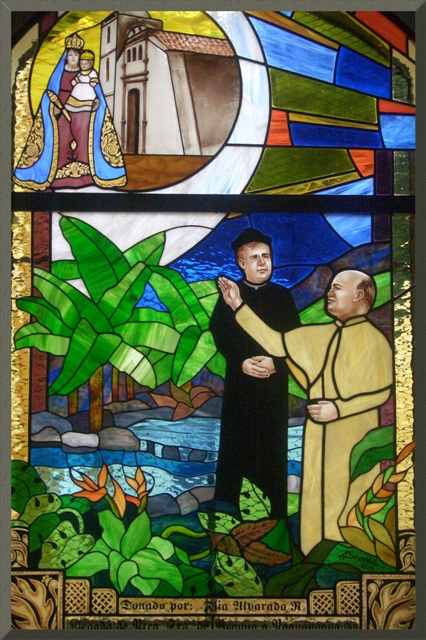 fotografia